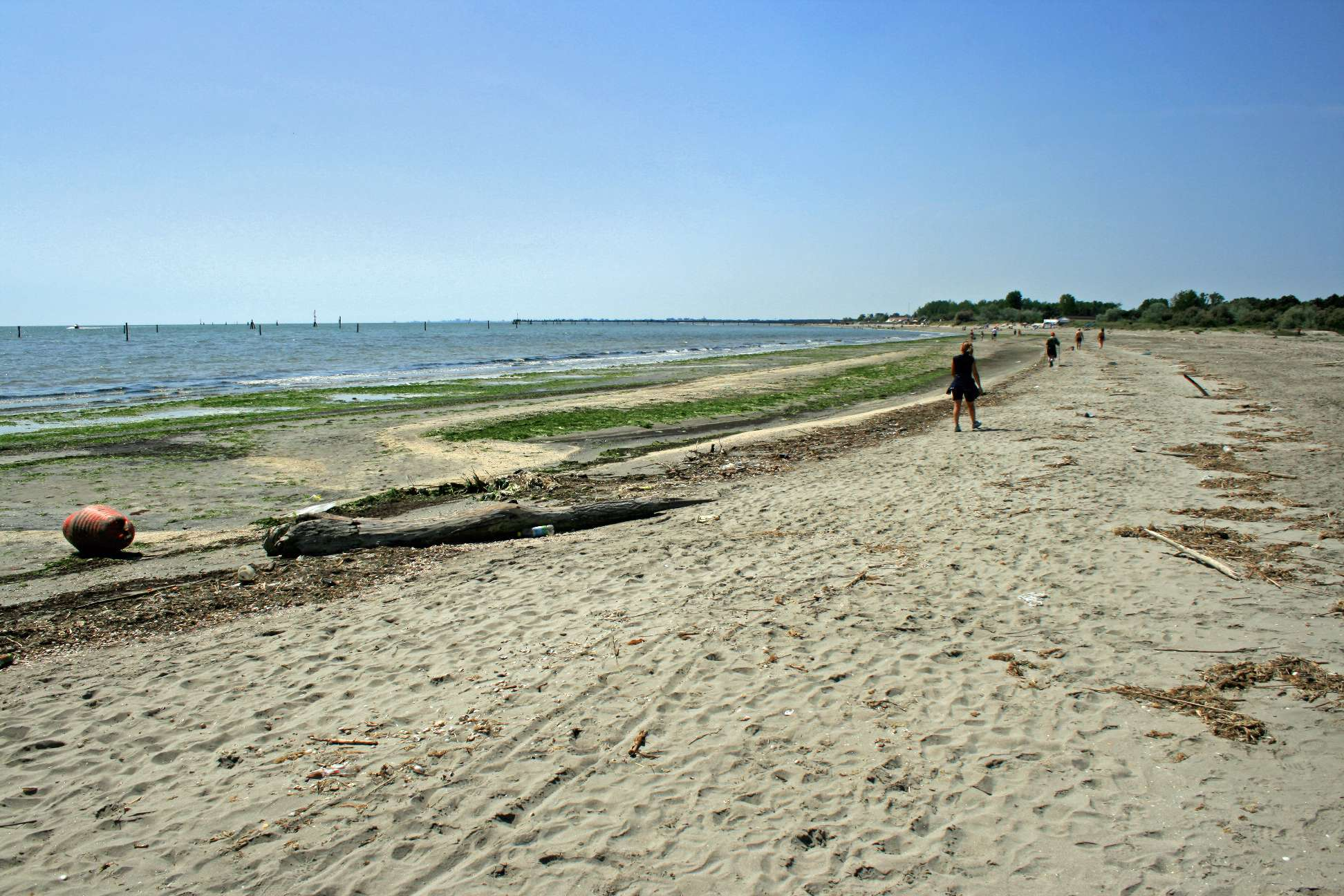 Lido di Volano